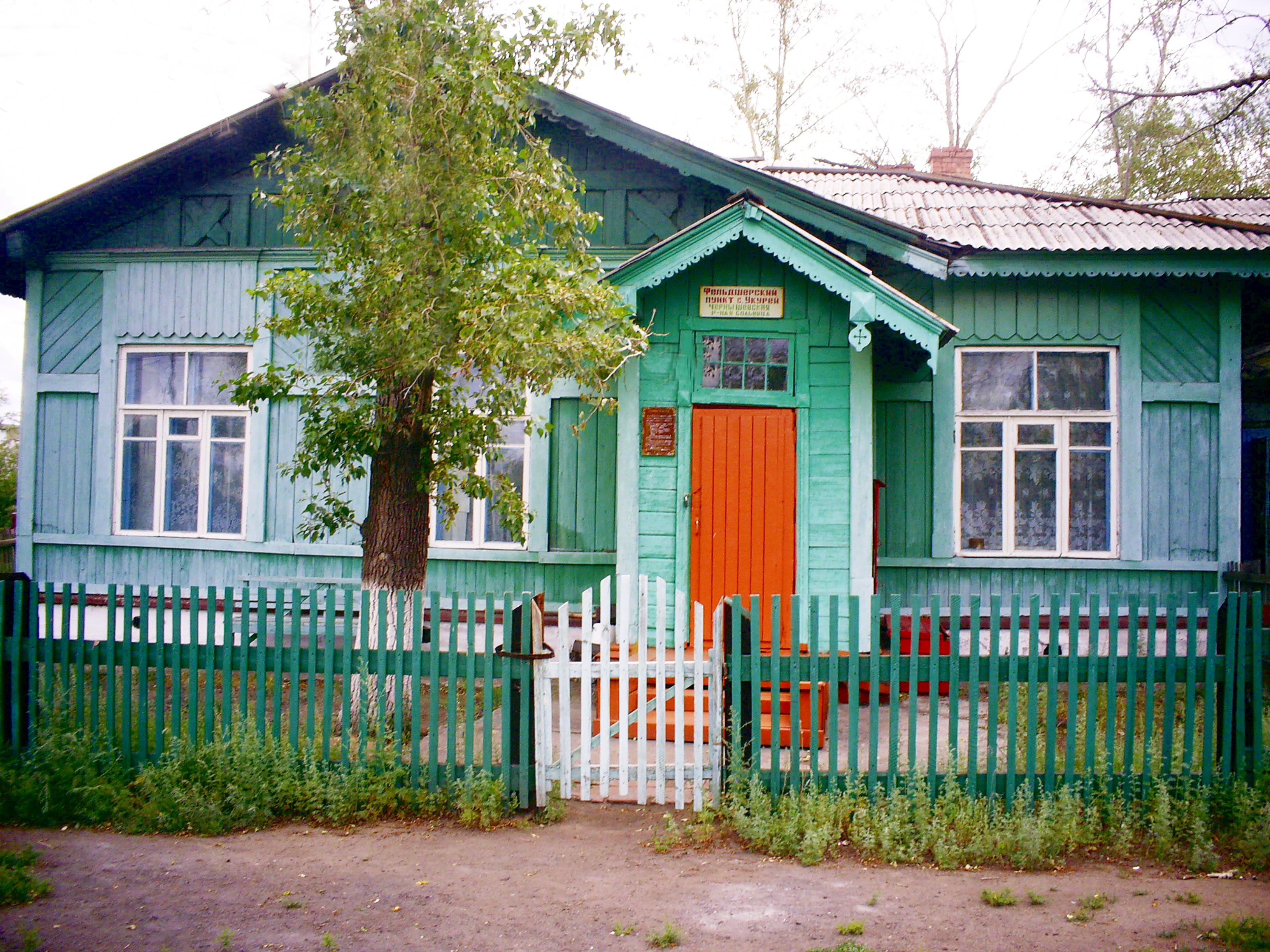 Укурей